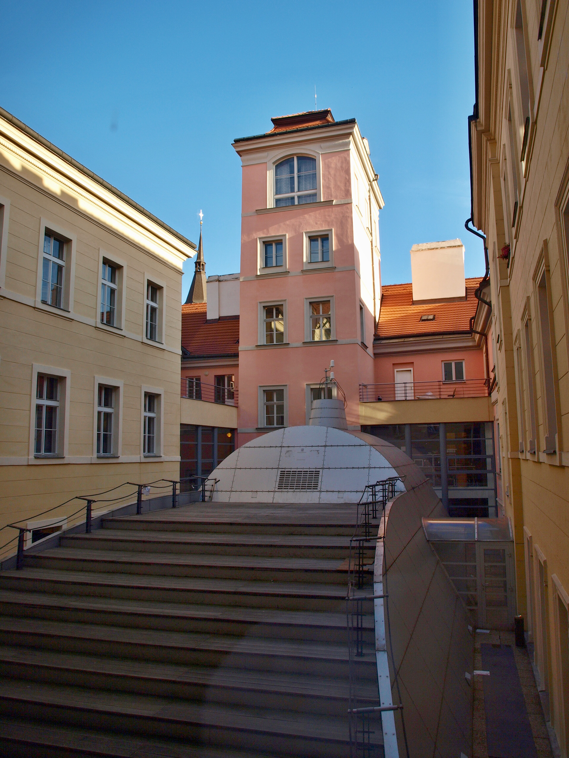 Palác Kokořovských - DAMU